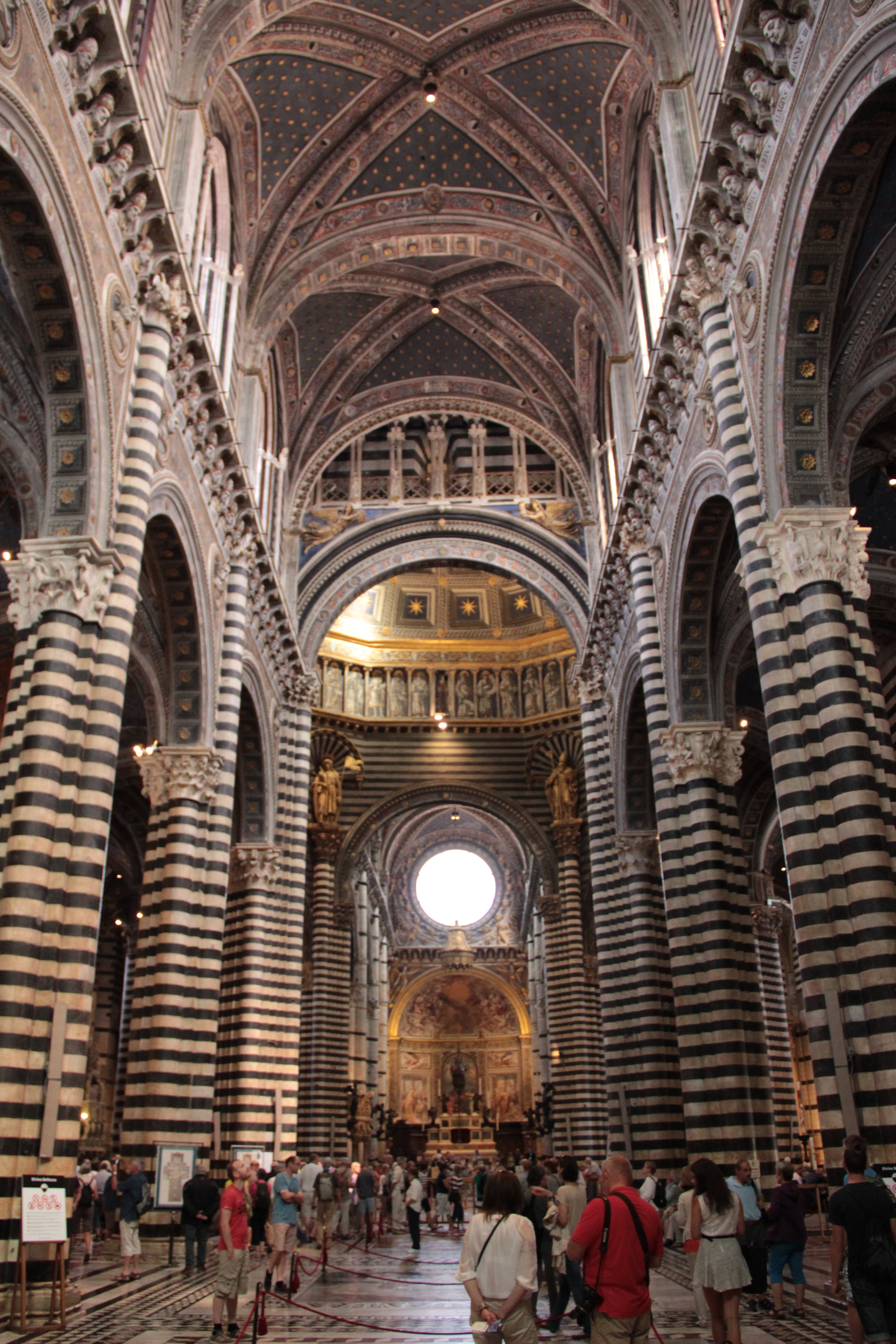 siena 02